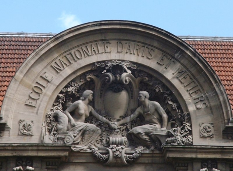 Détail de la façade du bâtiment historique de l'ENSAM, 151bd de l'Hôpital, Paris (XIIIe arrondissement)